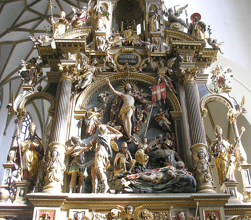 Ehemalige Benediktinerstiftskirche St. Ulrich und Afra (Augsburg, Bayerisch-Schwaben). Südlicher Seitenaltar. Auferstehung Christi. Eigene Aufnahme, März 2007 / Former Benedictine monastery church St. Ulrich and Afra (Augsburg, Bavaria, Germany). Side Altar (Southern transept). Resurrection of Christ. Own photo, March 2007